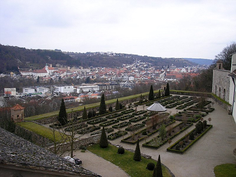 Willibaldsburg über Eichstätt (Oberbayern). Bastionsgarten und Blick auf die Altstadt. Eigene Aufnahme, Dez. 2006 / Willibaldsburg castle above Eichstätt (Upper Bavaria, Germany). The garden and the town. Own photo, Dec. 2006